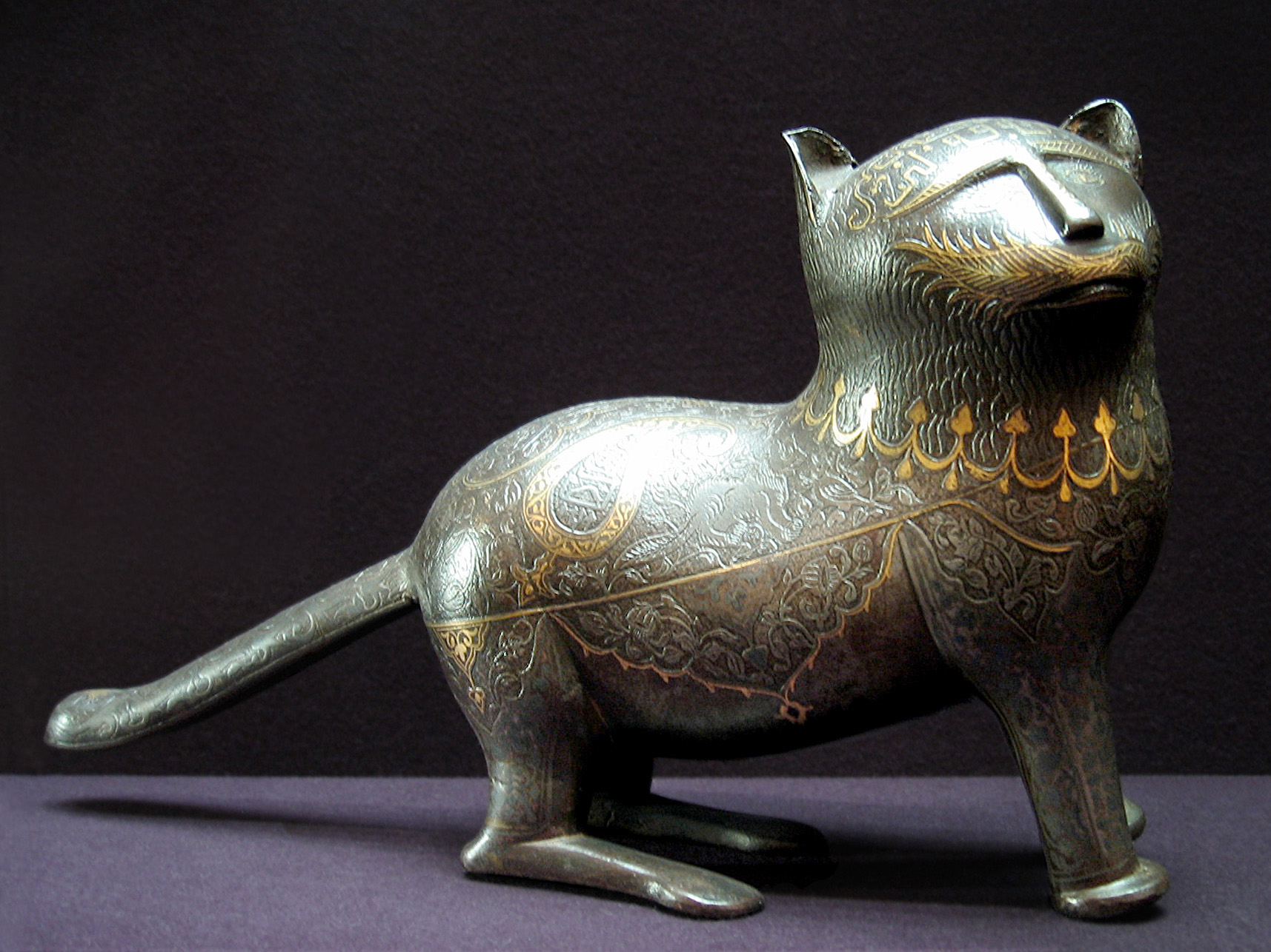 Félin Iran, XIXe Siècle Acier coulé, décor gravé, incrusté d'or et d'argent, ciselé, maté